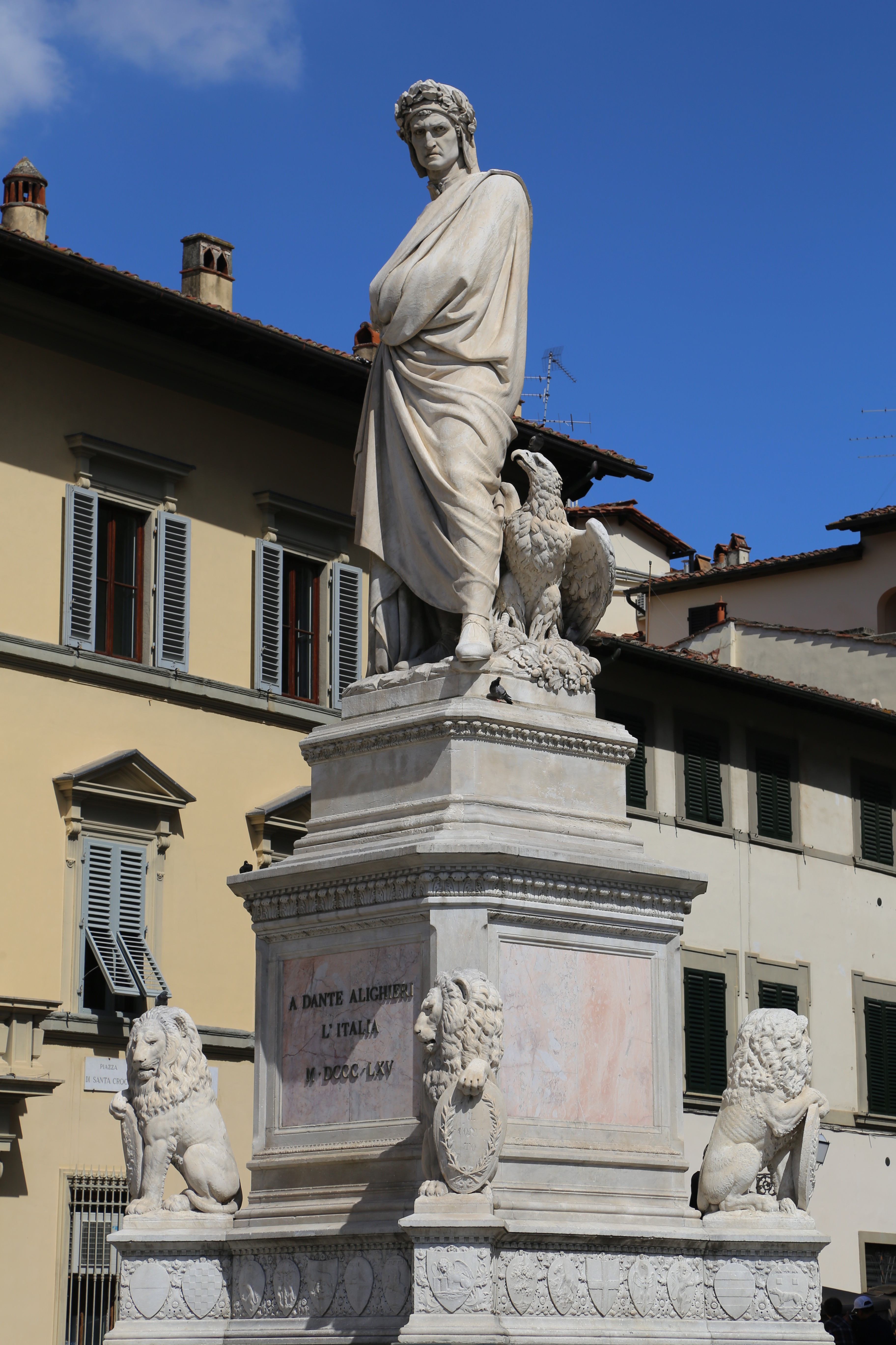 Enrico Pazzi: Dante Alighieri, Statue vor Santa Croce Florenz, 1865